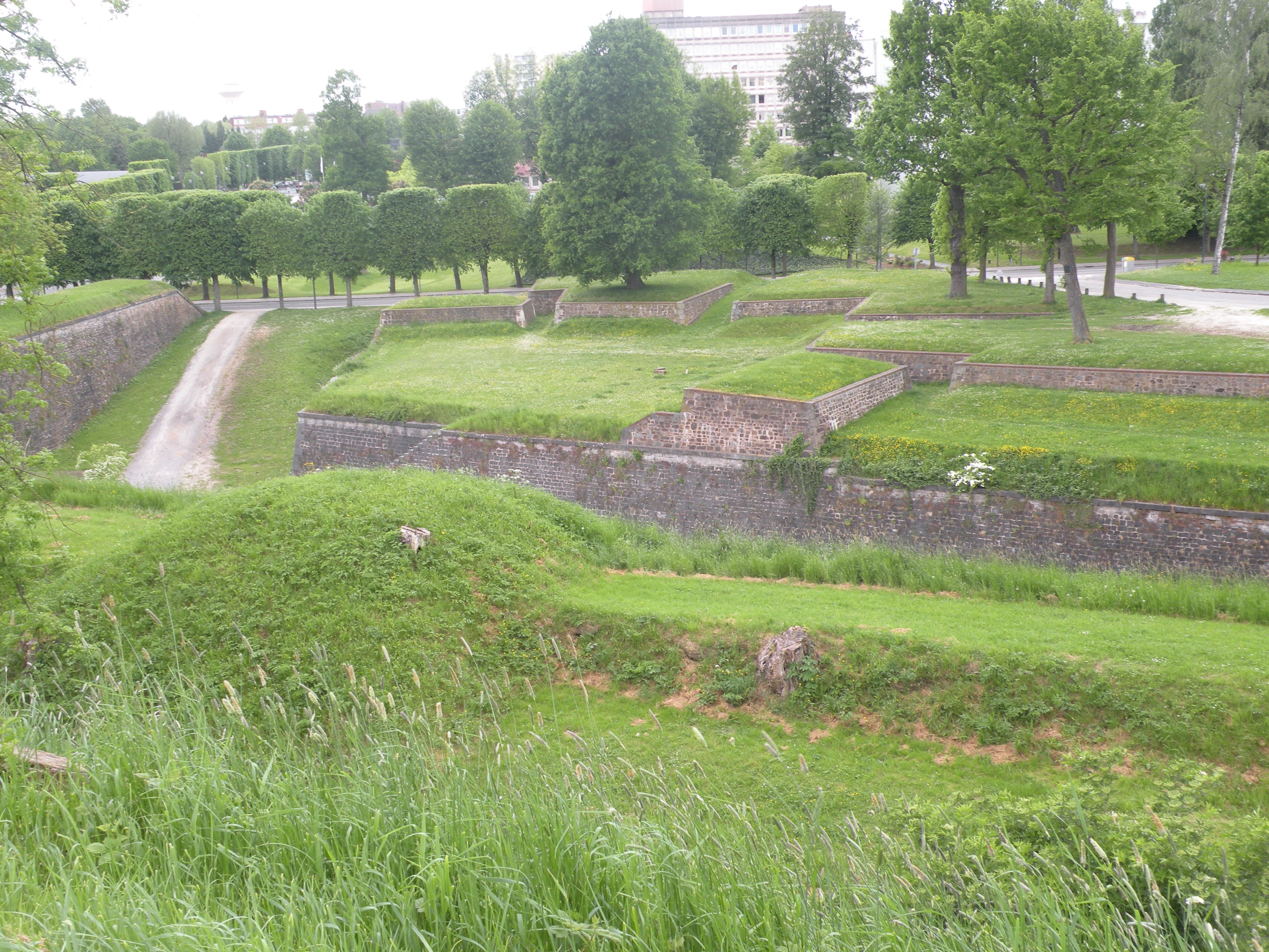 Citadelle de Maubeuge